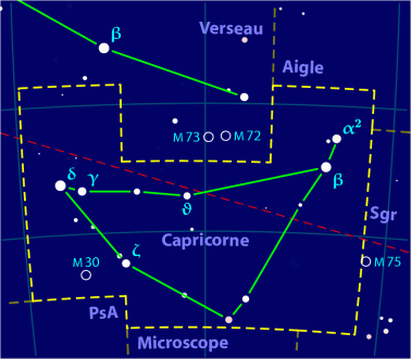 Carte pour la constellation Capricorne Produite à l'aide du logiciel PP3